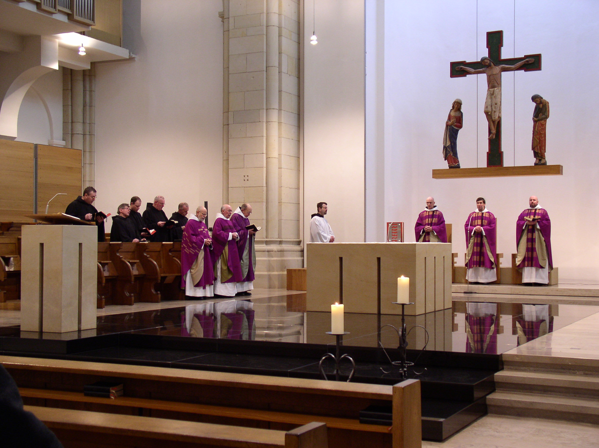 Abtei Gerleve, Kirche